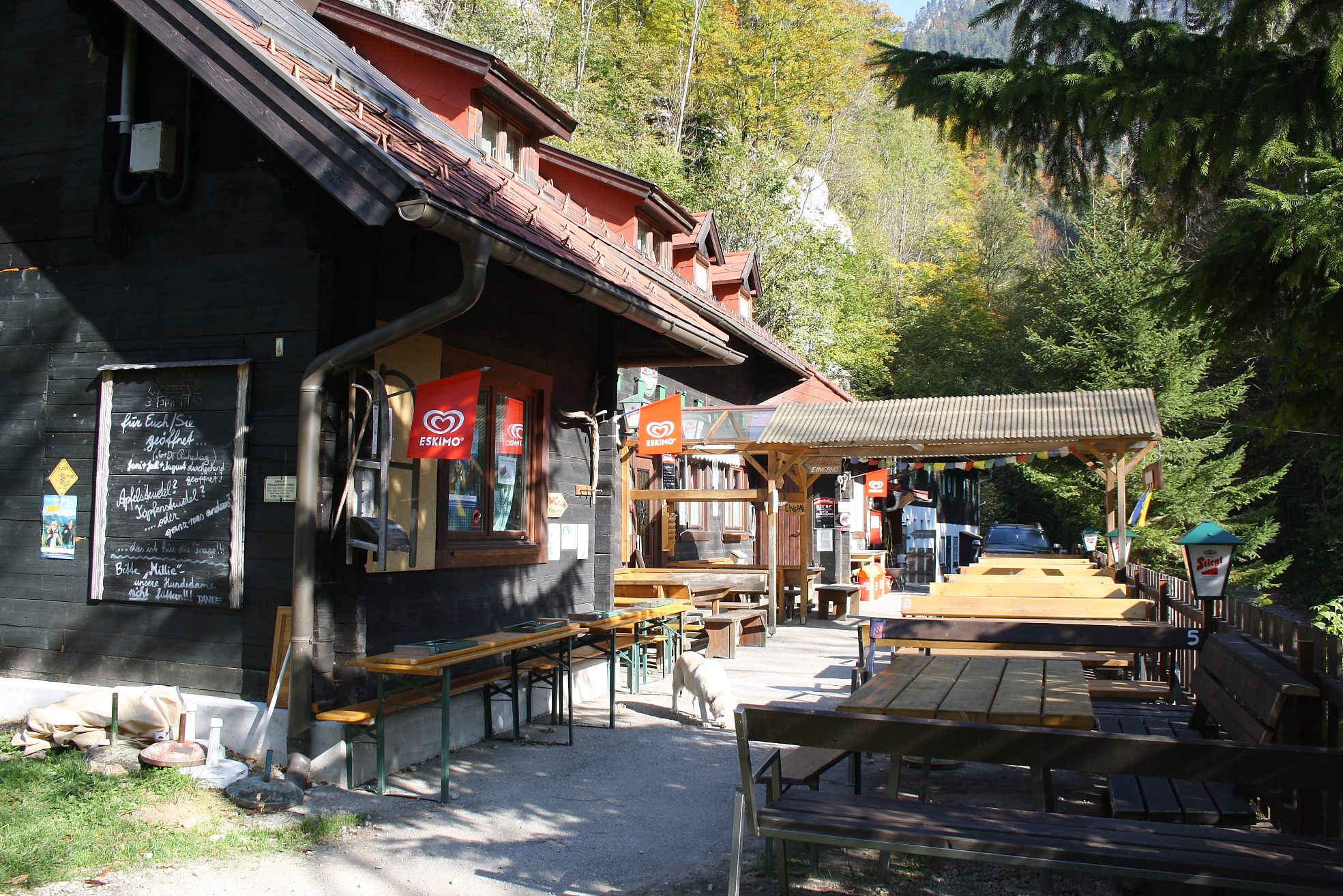 Die Südwestansicht vom Weichtalhaus im Höllental zwischen dem Raxmassiv und dem Schneeberg.